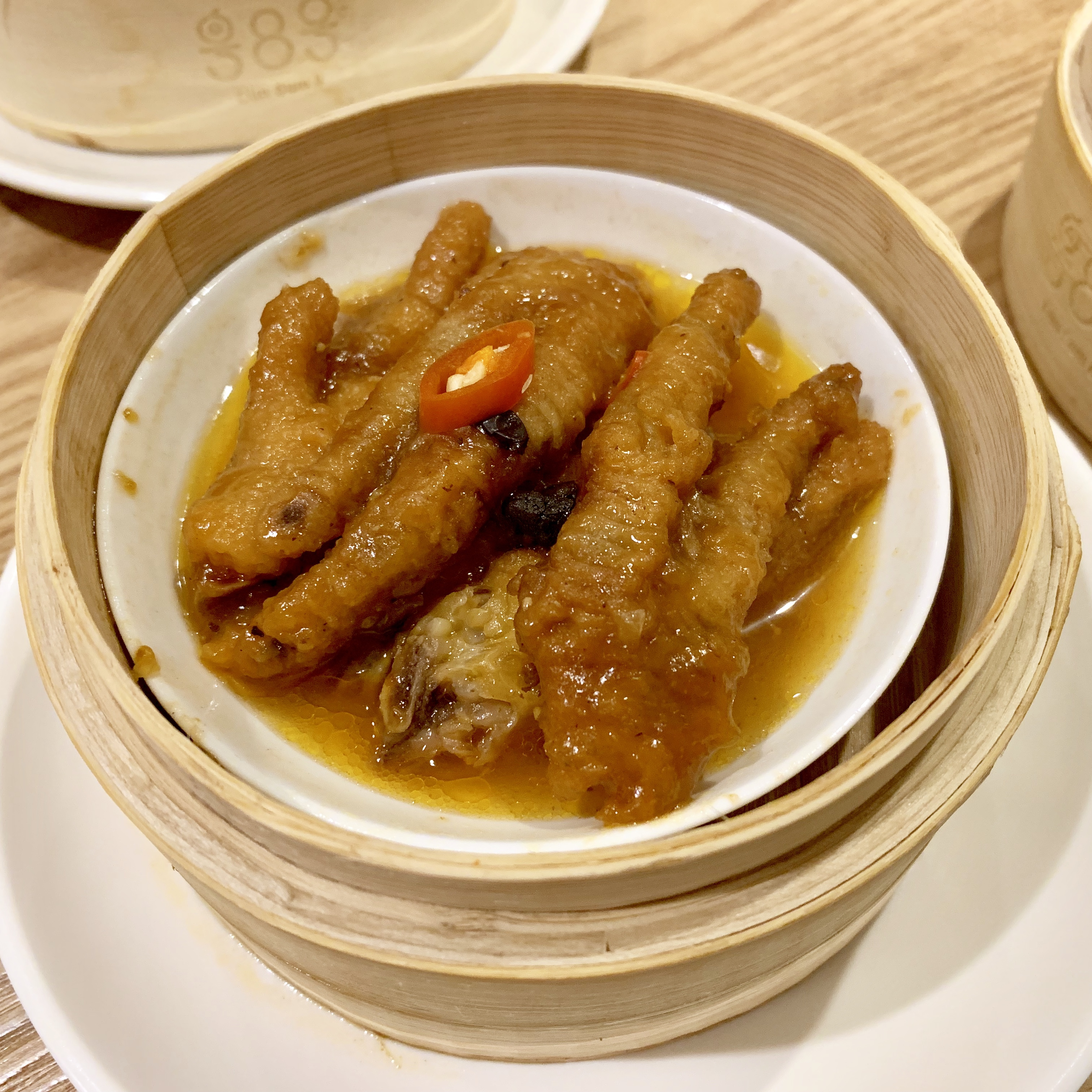 點8號, 米其林星級主廚專賣店, 台北, 台灣, Taipei, Taiwan